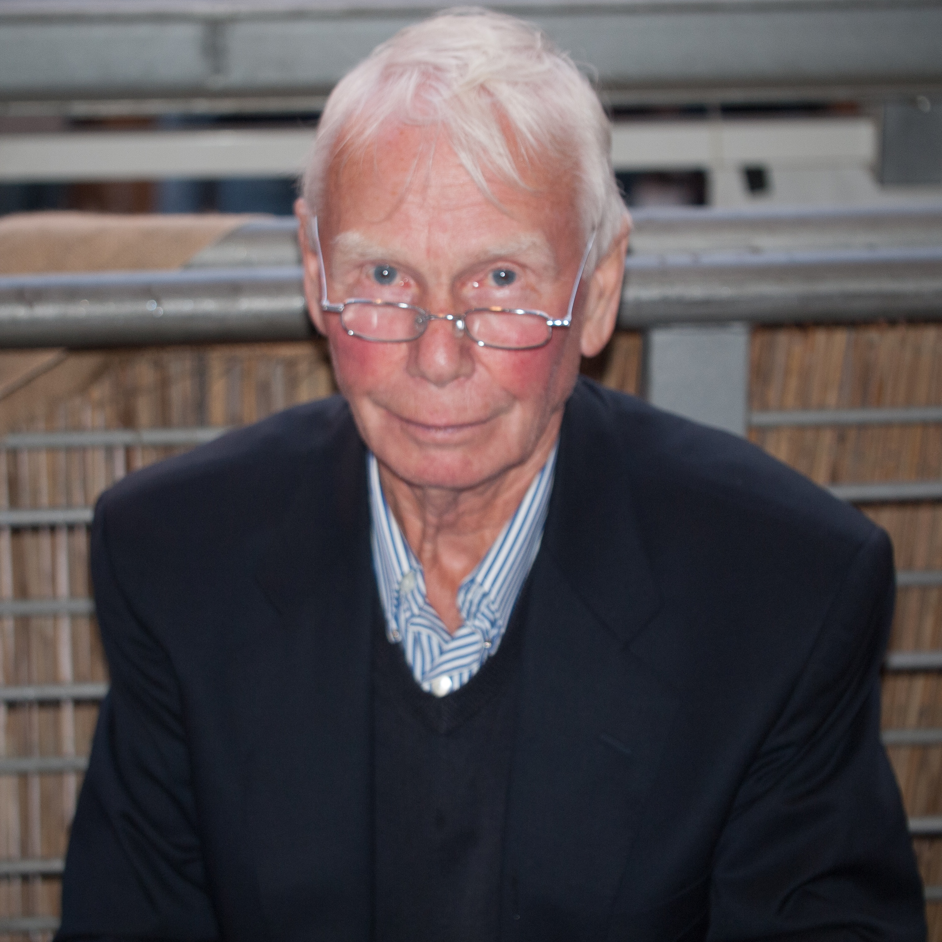 Ludwig „Lulu“ Nolden (am 12.08.2014)